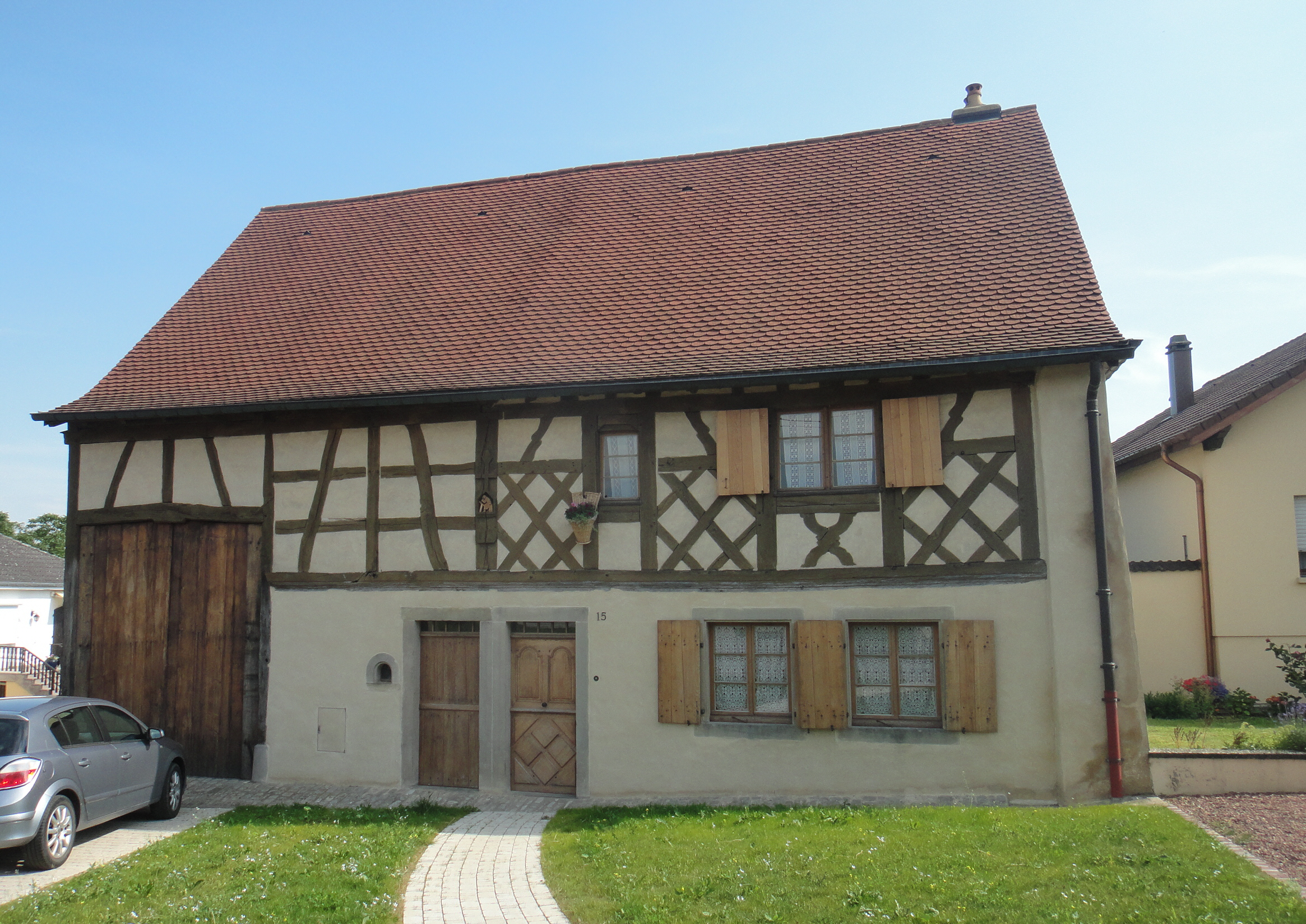 La maison Bonert à Hellimer en Lorraine. Maison en pans de bois édifiée en 1716